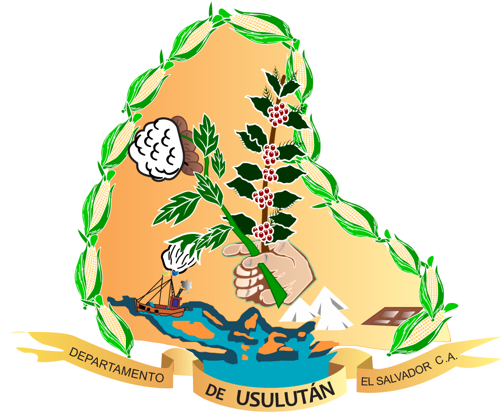 Escudo del departamento de Usulután y de su ciudad